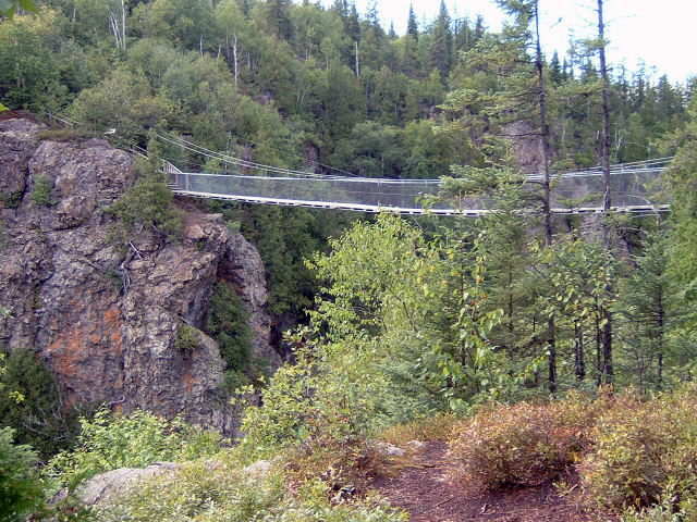 Pont suspendu sur le lac La Haie dans le parc national d'Aiguebelle